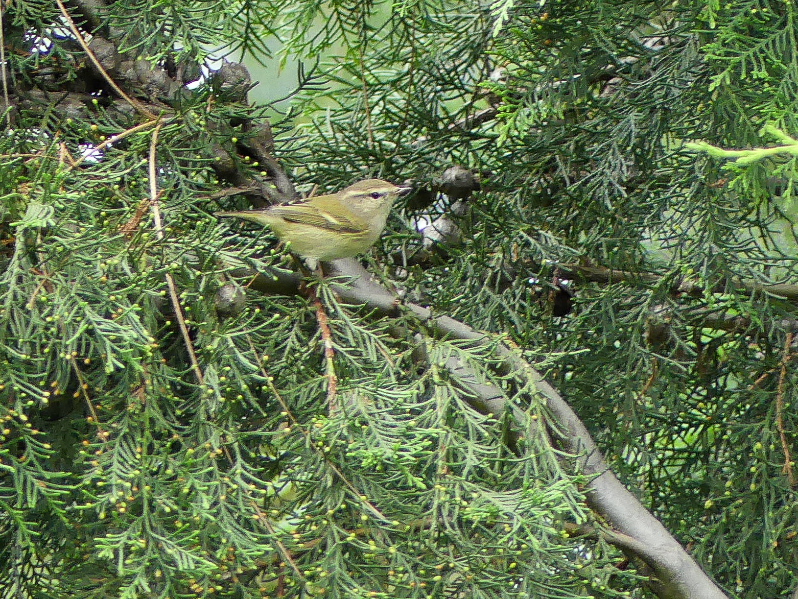 Hume's Leaf Warbler